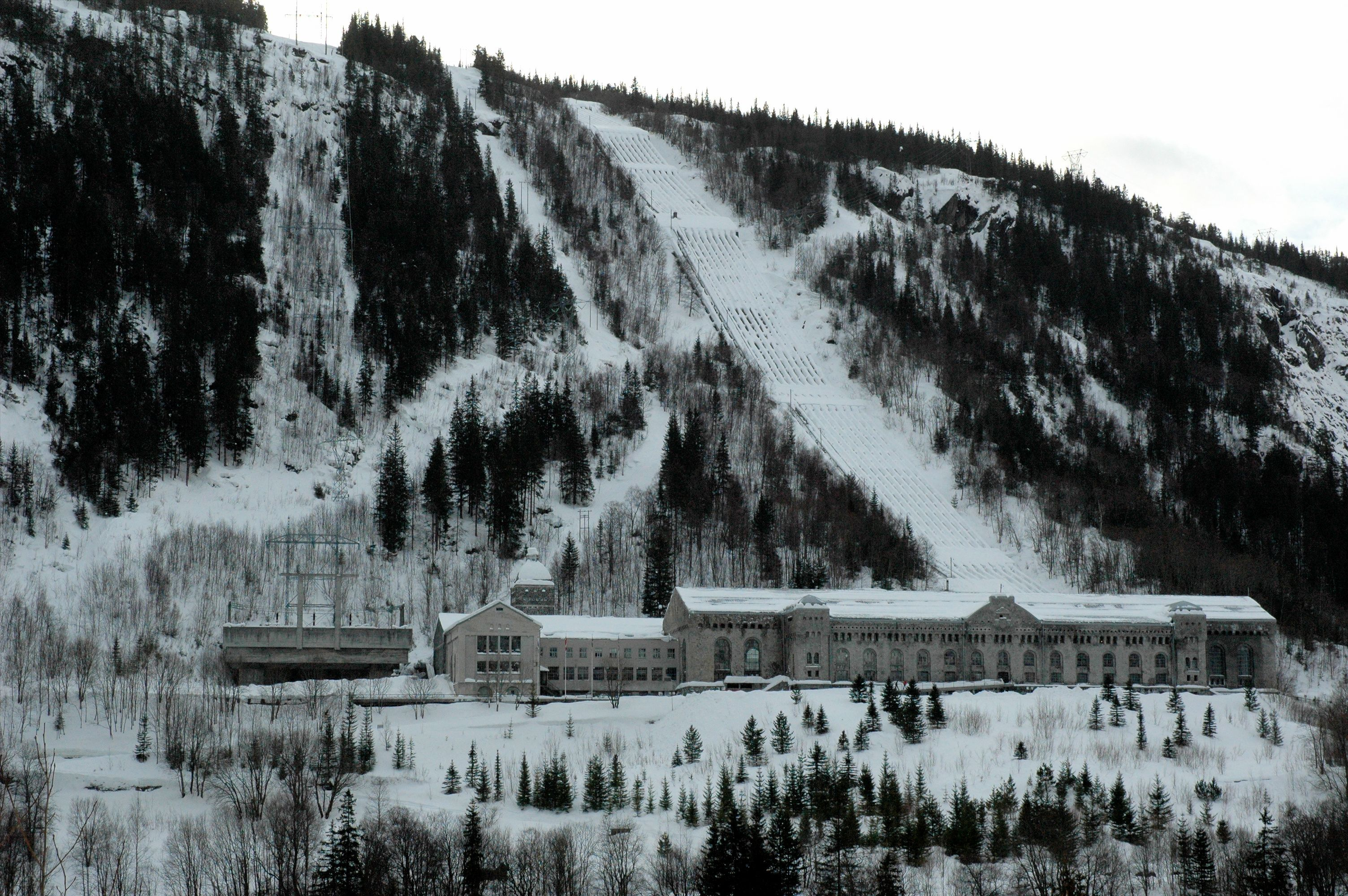 Vemork